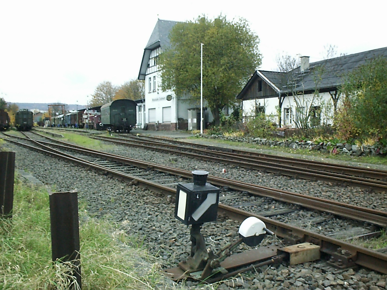 Bahnhof Wiesbaden-Dotzheim, November 2007 — Wiesbaden-Dotzheim railway station, Germany, Nov. 2007